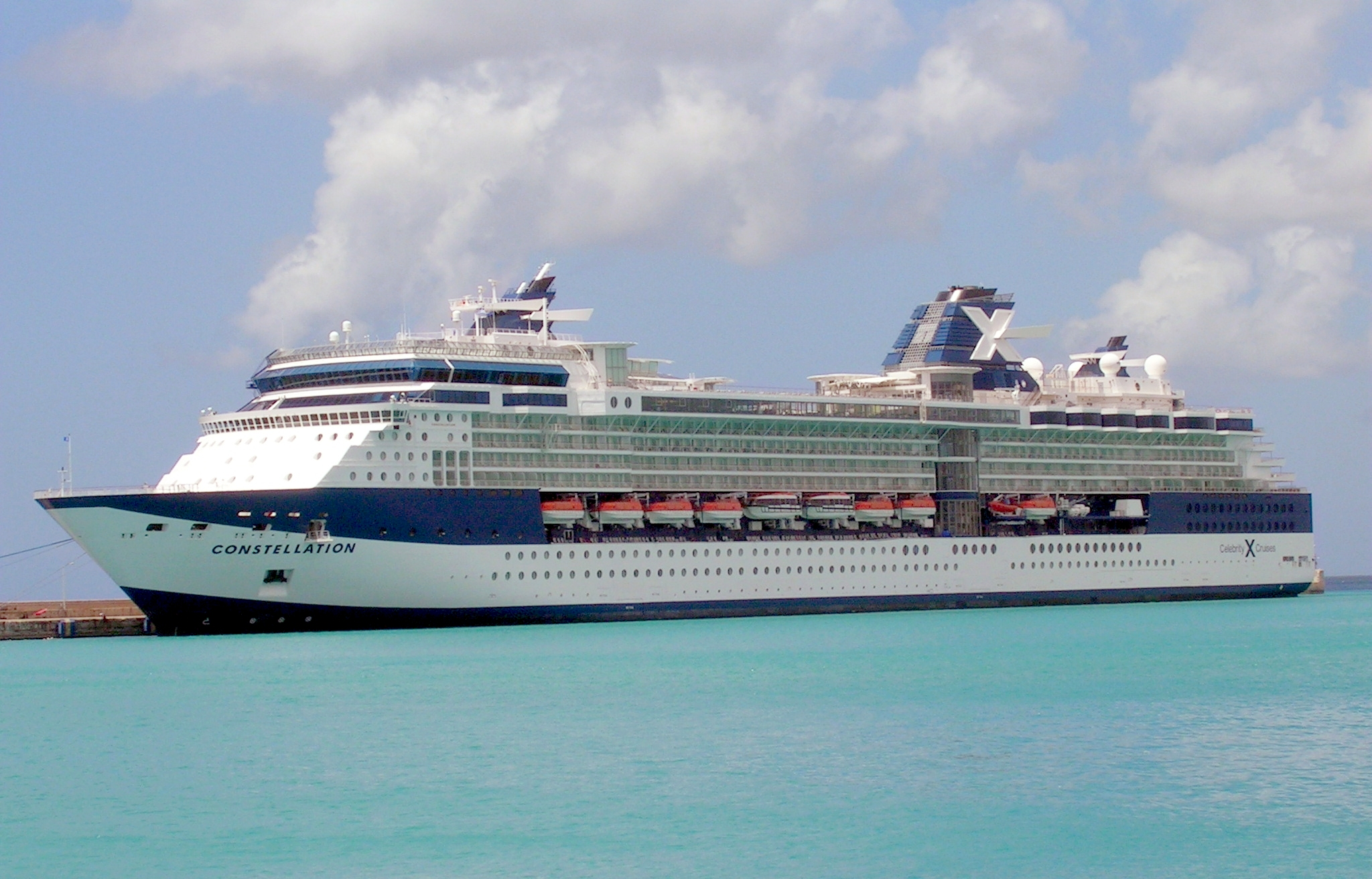 Le Celebrity Constellation à la Barbade.